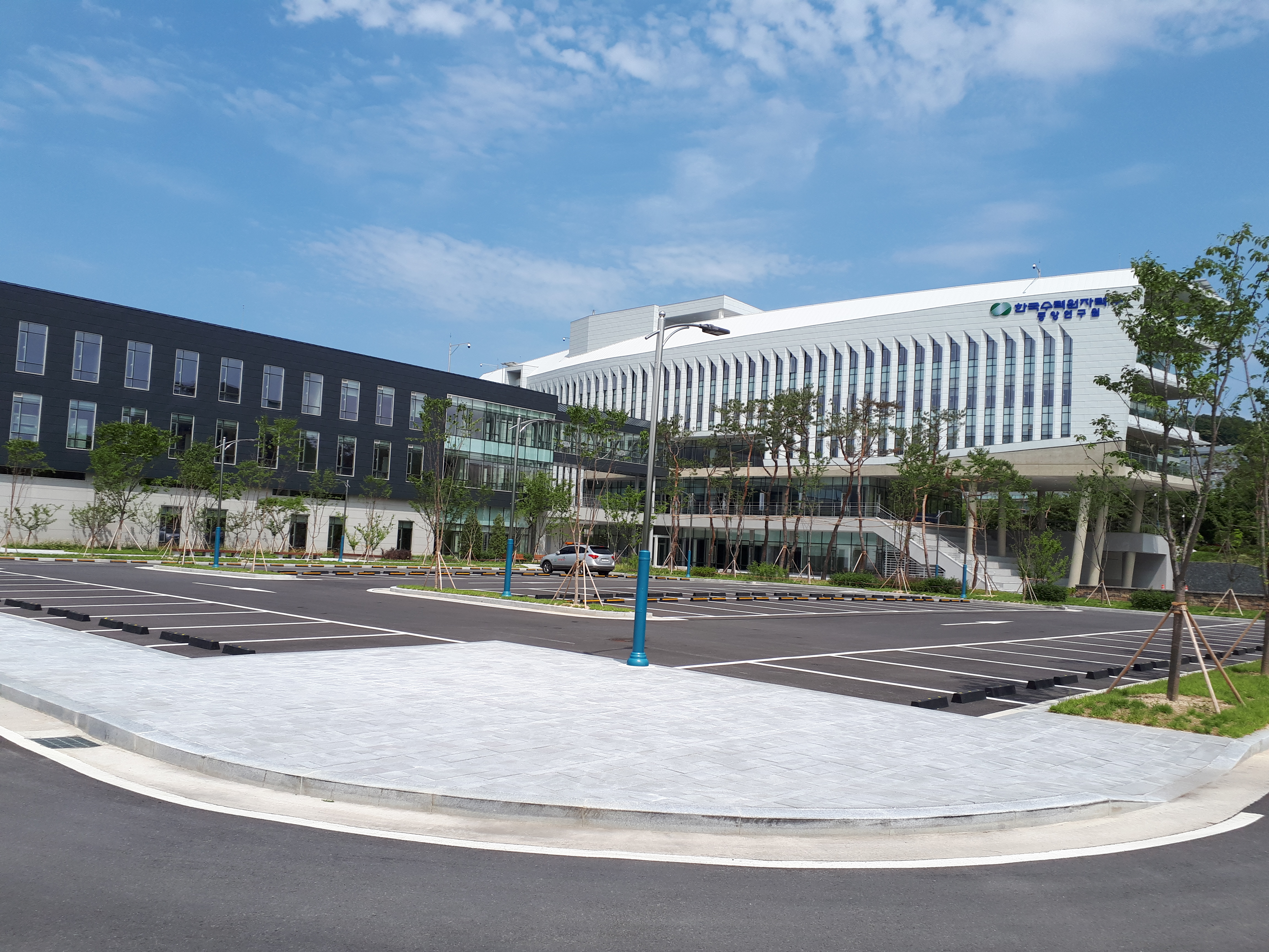 한국수력원자력 중앙연구원